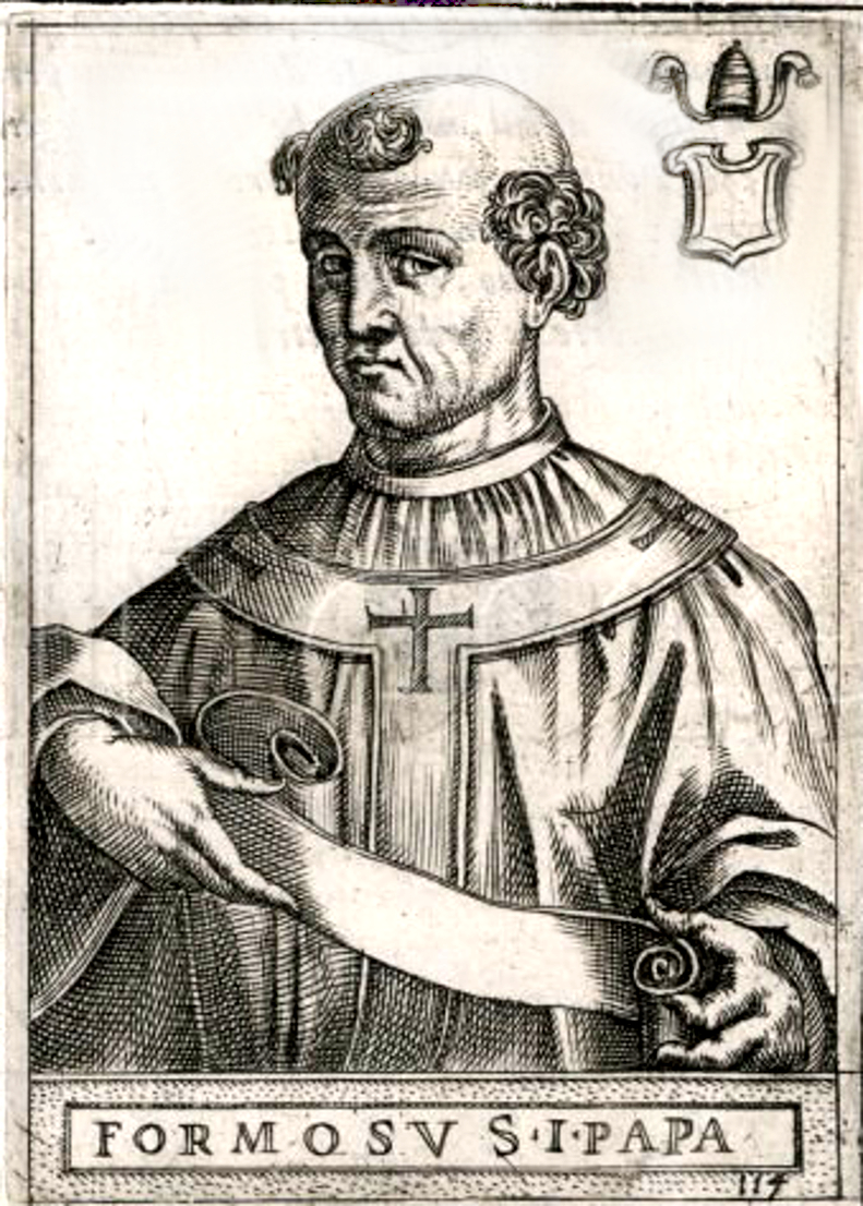 Pope Formosus